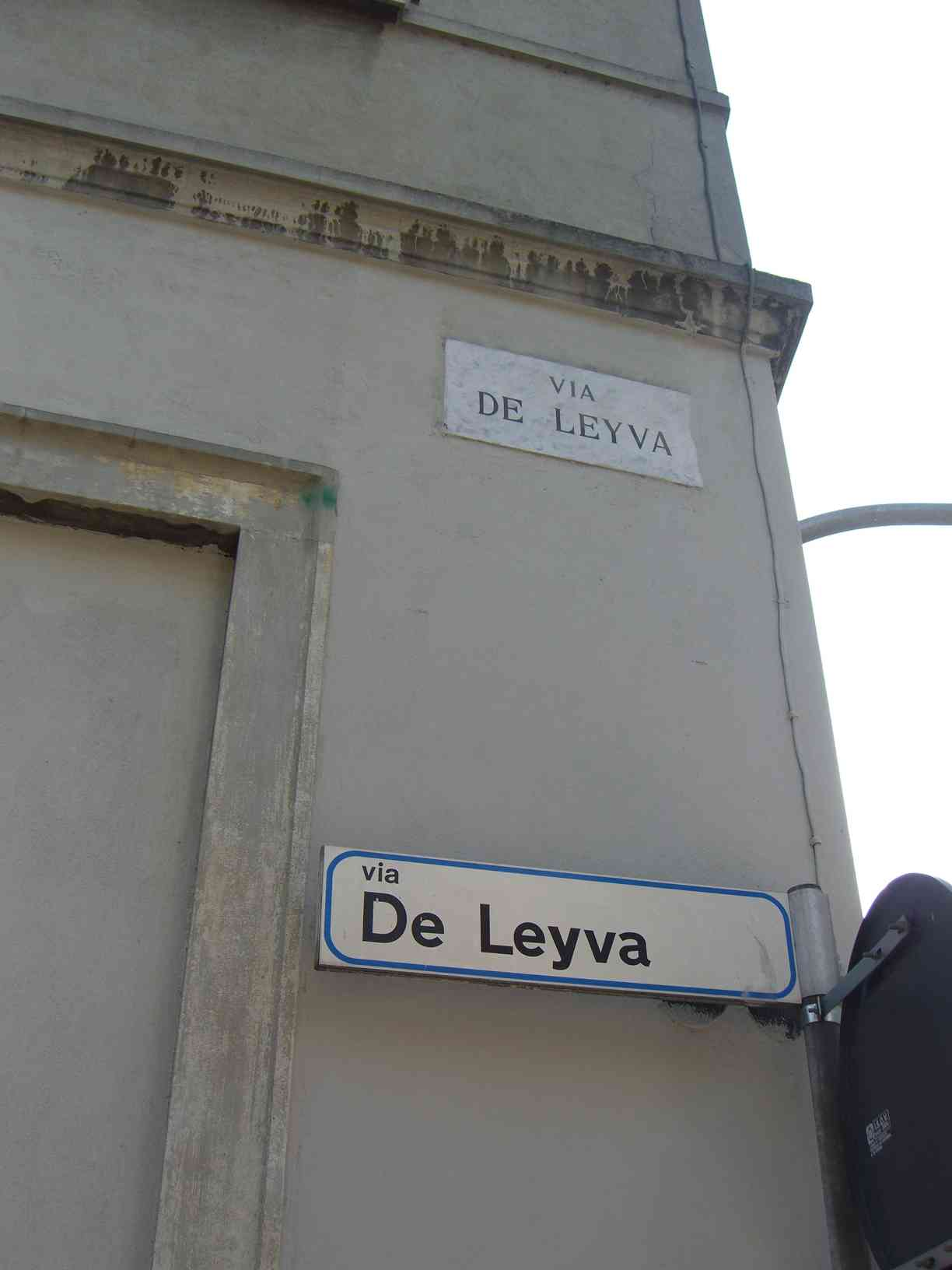 MB Monza via De Leyva all'incrocio con via Lecco